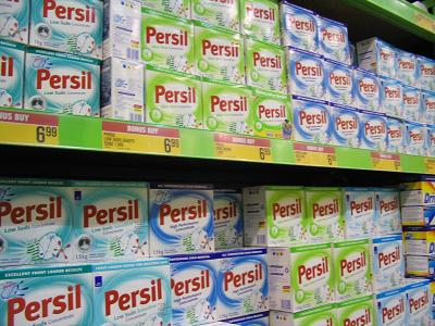 Pakken Persil in een supermarkt